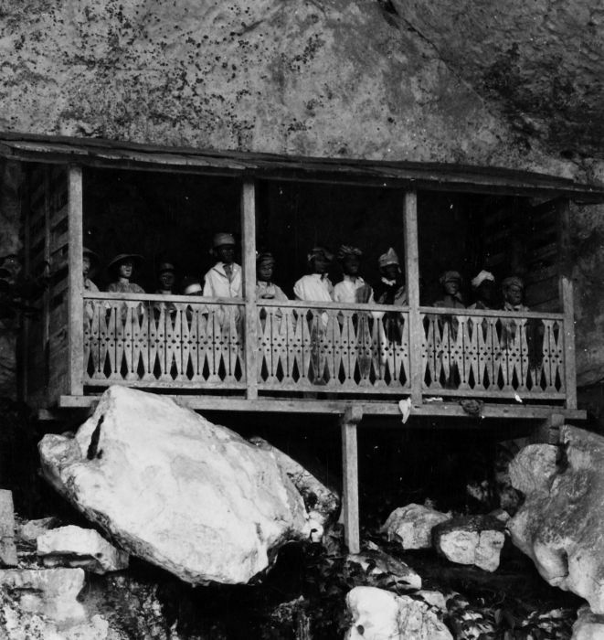 Negatief. De tau-tau is een pop die de overledene voorstelt.. Tau-tau op de galerij voor een rotsgraf nabij het dorp Londa